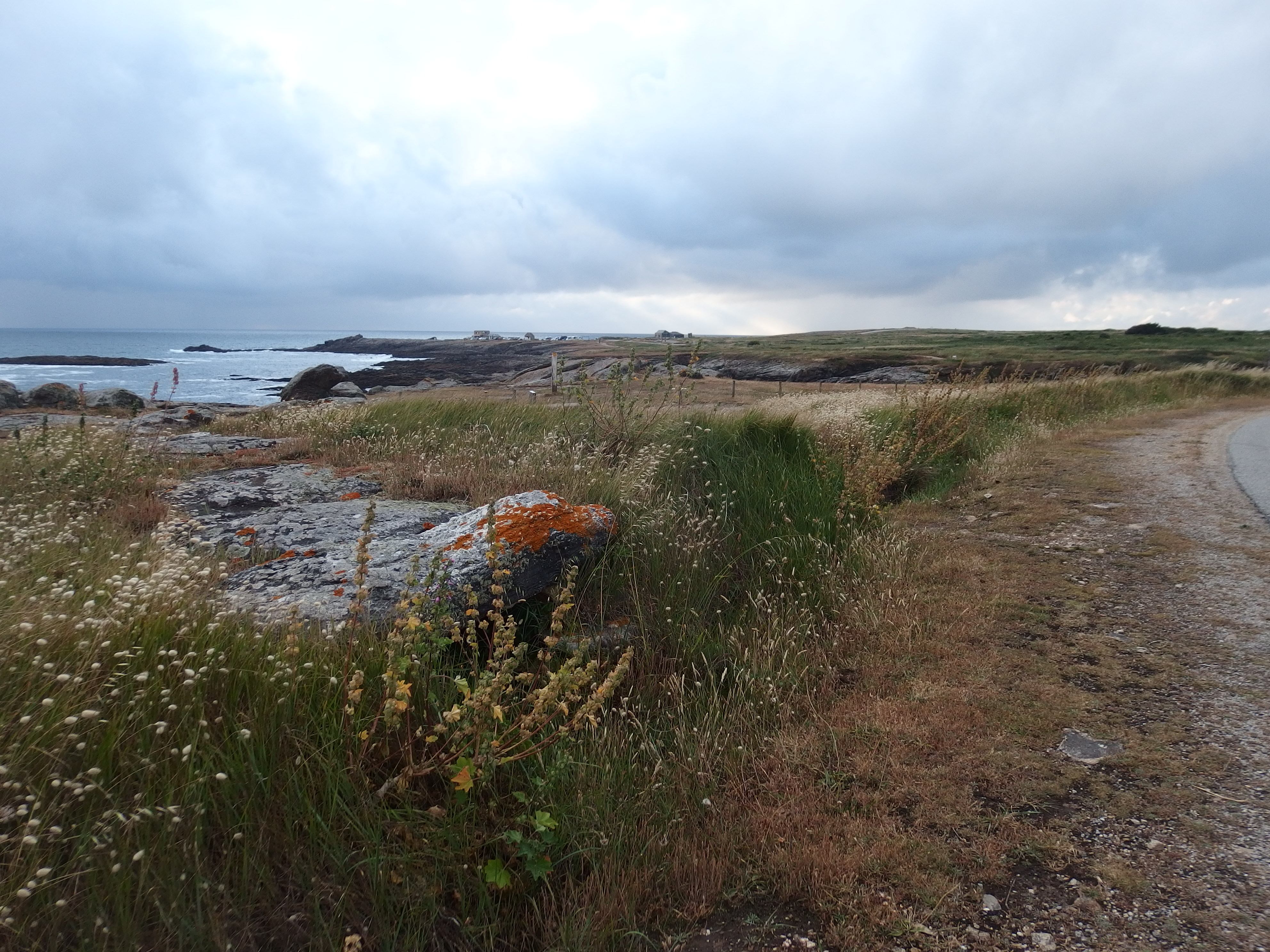 Allée couverte de la Pointe-de-Guéritte, à Quiberon.